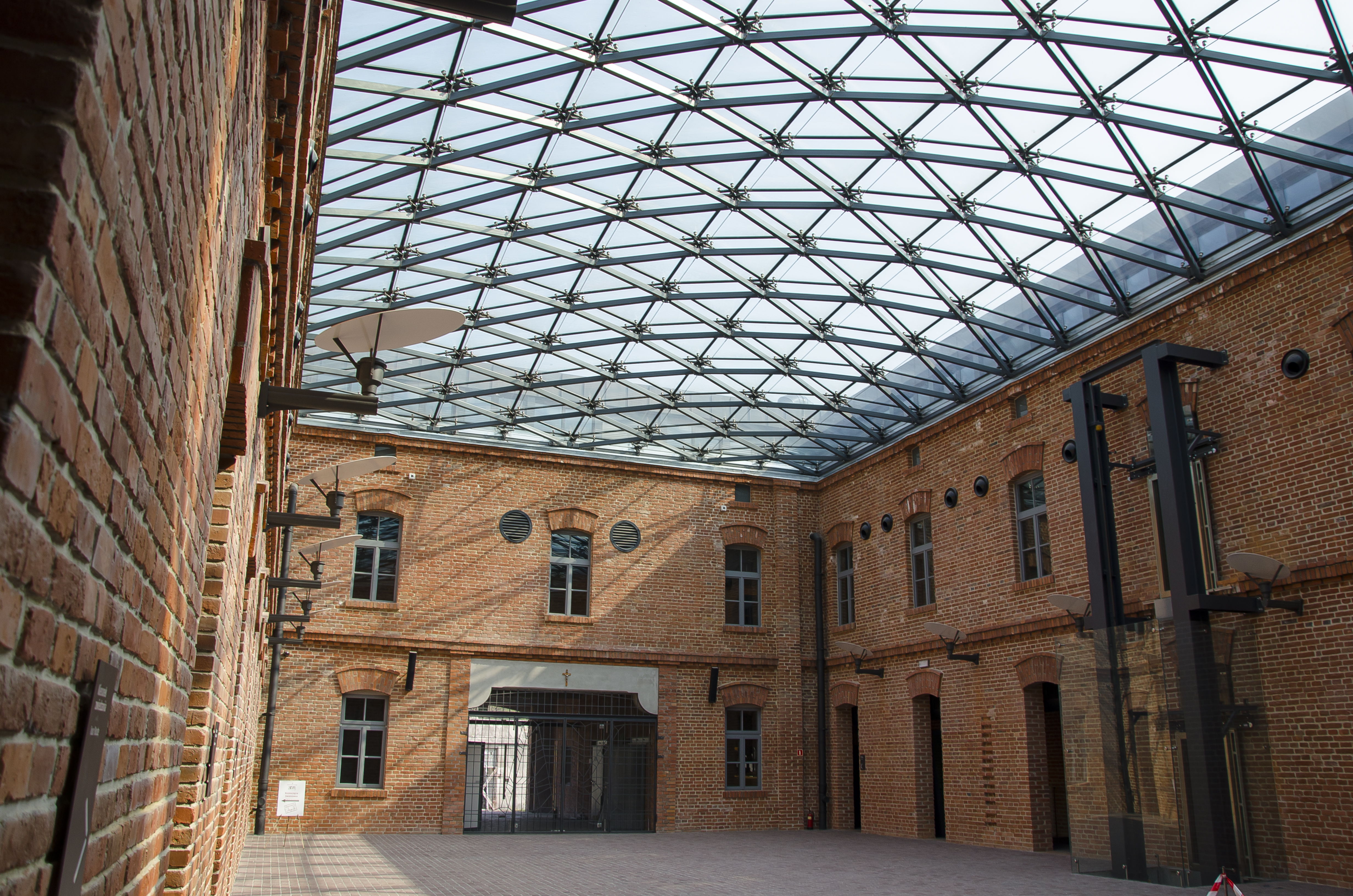 Warszawskie, Kraków, Poland